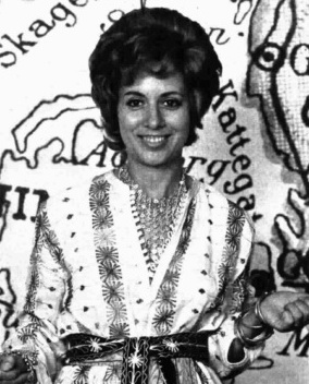 Italian tv-presenter Rosanna Vaudetti